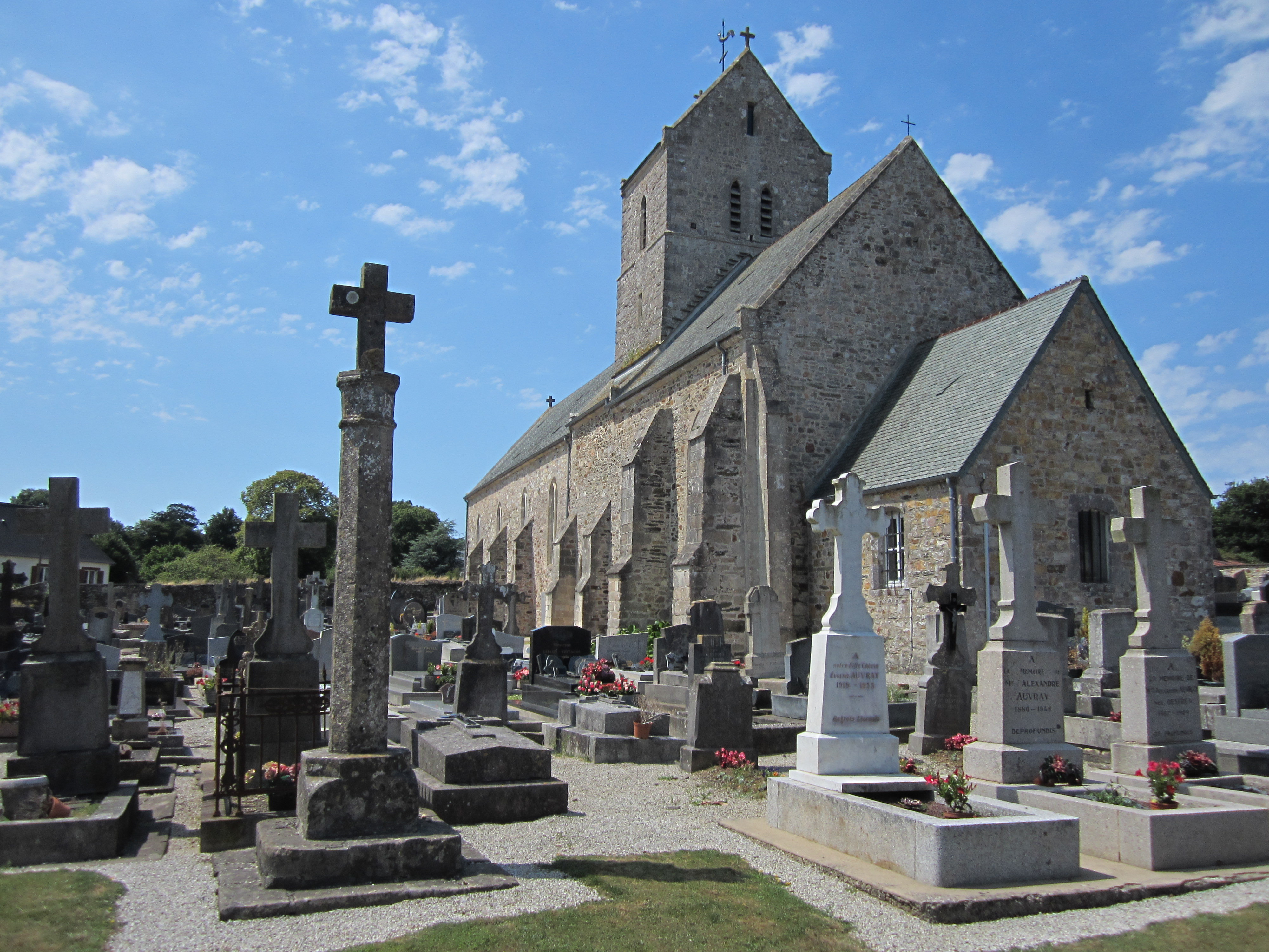 église Saint-Amand de Virandeville, Manche